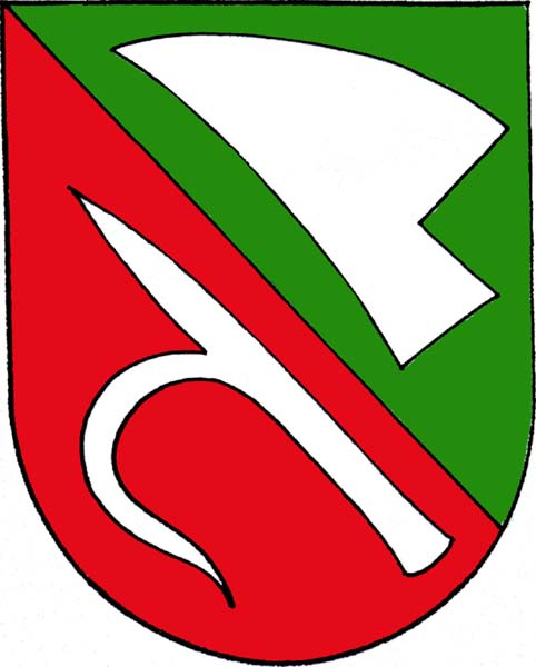 Znak obce Senorady